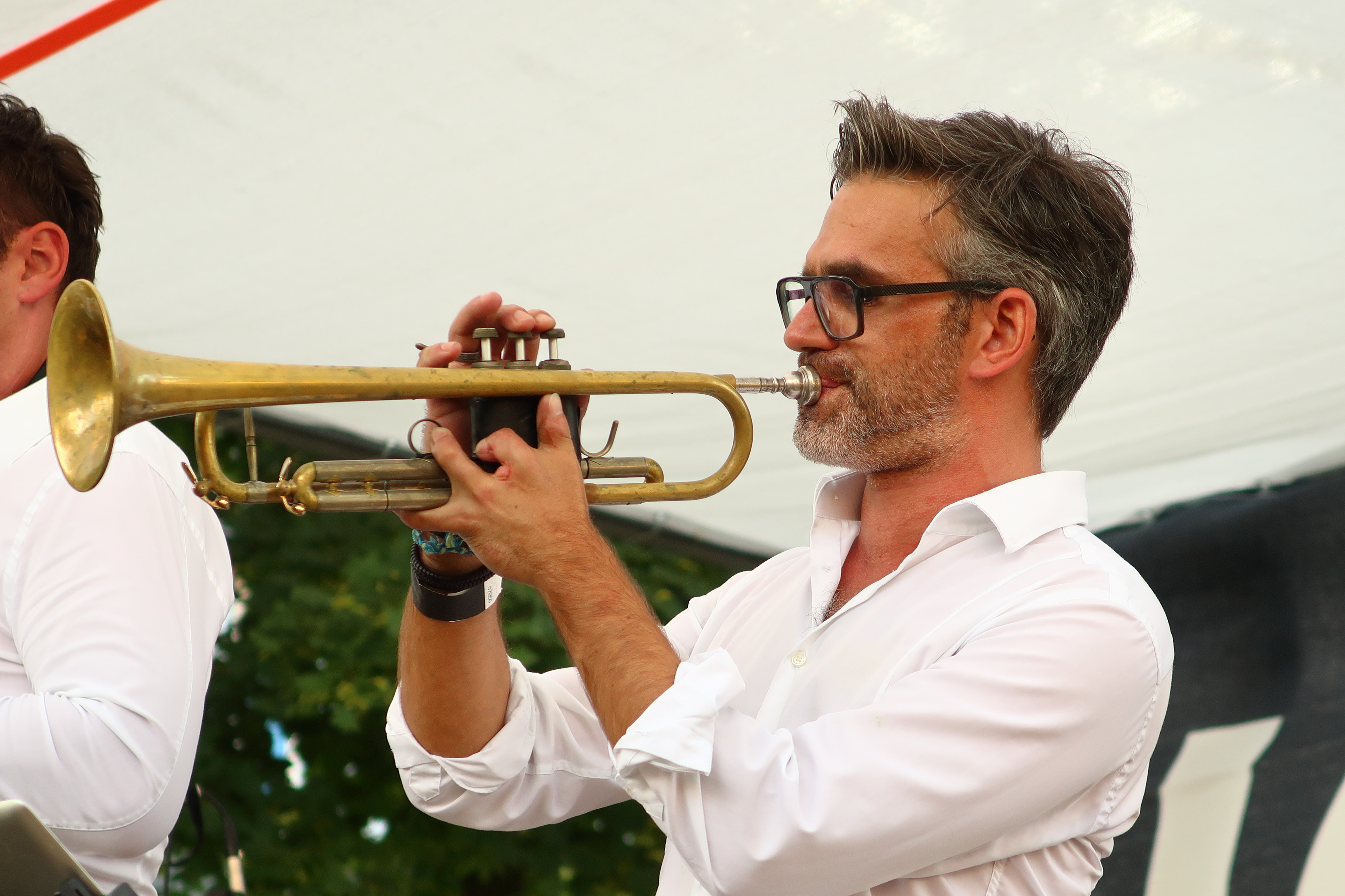 Gerd Rahstorfer, Trompeter und Komponist, bei seinem Auftritt bei "Jazz im Park" mit der Gruppe Jazzodrom am 2016-09-10 in Vöcklabruck